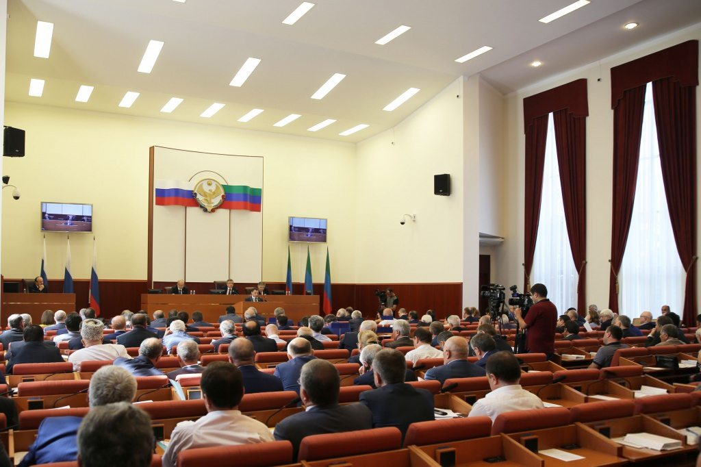 Парламент Дагестана